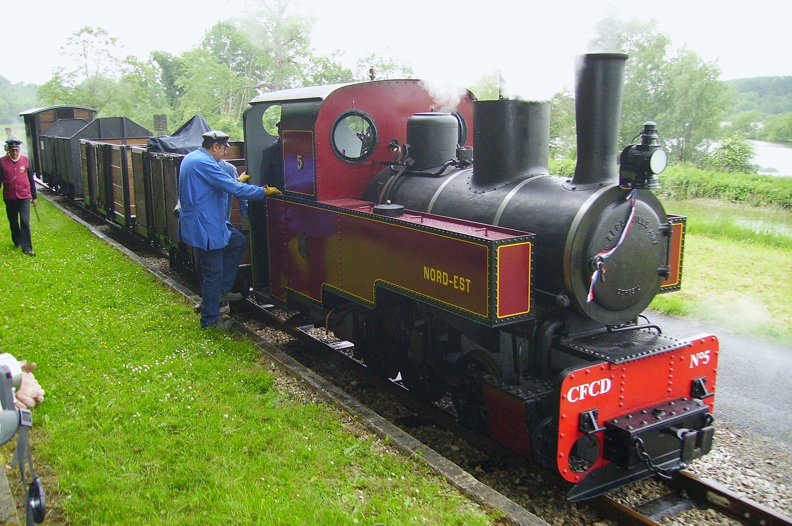 Croisement en gare de Cappy avec la 030 T N°5 Decauville sur le Chemin de fer Froissy-Cappy-Dompierre le 27 Mai 2007.